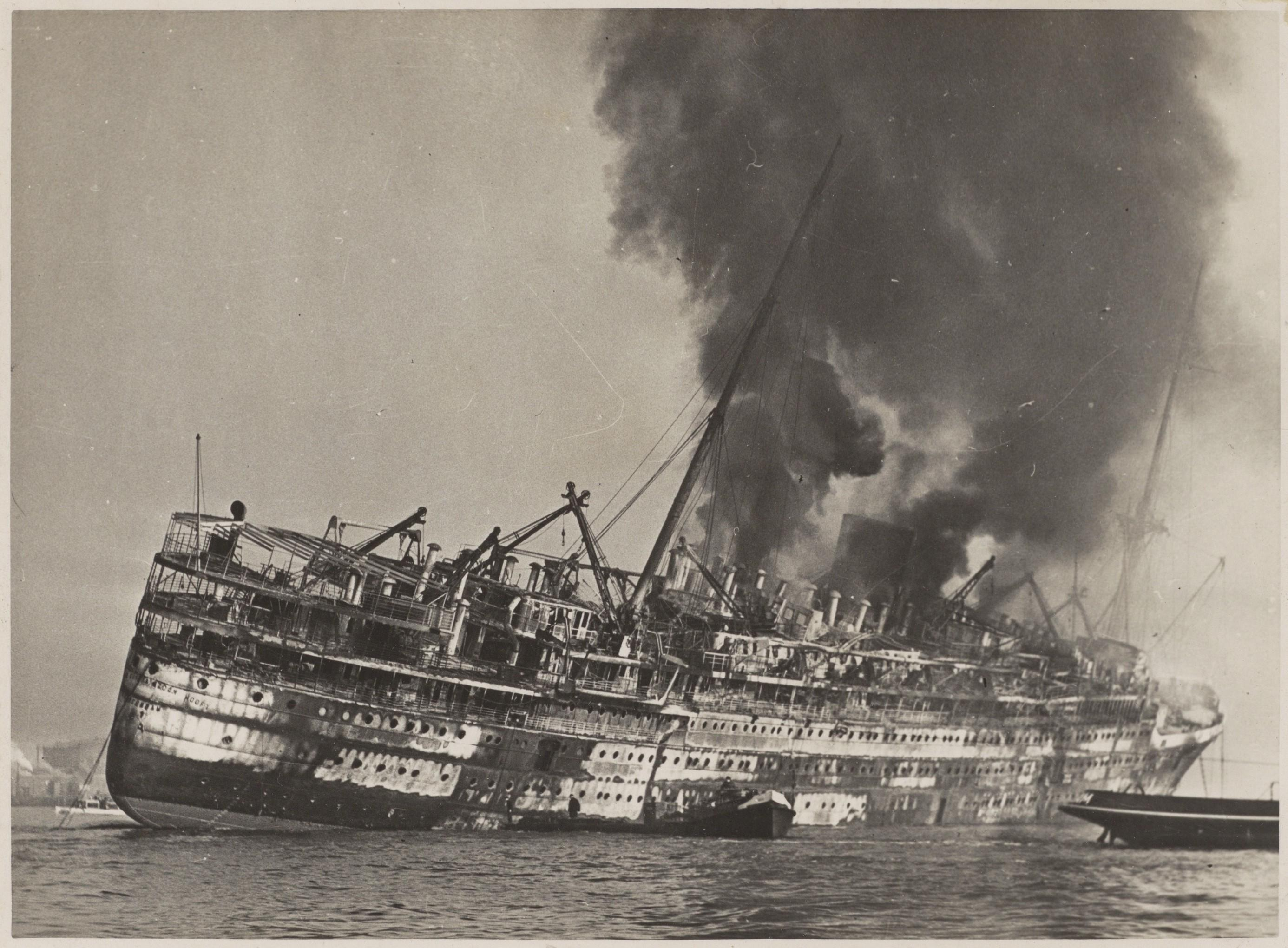 Beschrijving Brand op het mailschip Pieter Corneliszoon Hooft, voor anker in het IJ bij Schellingwoude Documenttype foto Vervaardiger Onbekend Anoniem Collectie Collectie Stadsarchief Amsterdam: foto-afdrukken Datering november 1932 Geografische naam Afgesloten IJ Inventarissen Afbeeldingsbestand ANWJ00333000001